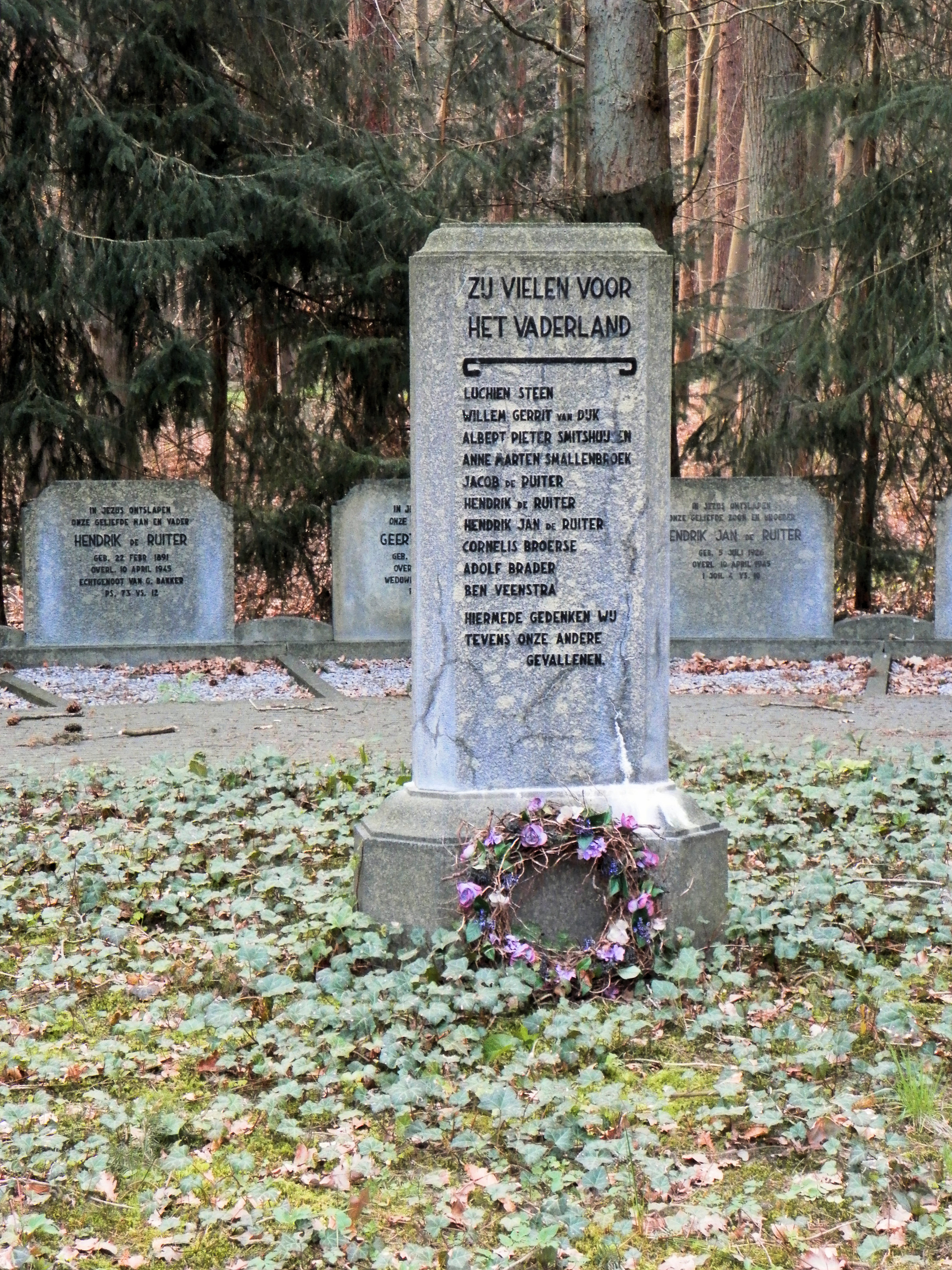 Monument ter herdenking aan gesneuvelden in de Tweede Wereldoorlog, op de Zuiderbegraafplaats in Assen.